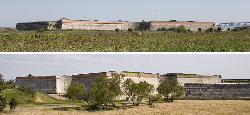 Fort La Prée - La Flotte - Île de ré - Charente-Maritime